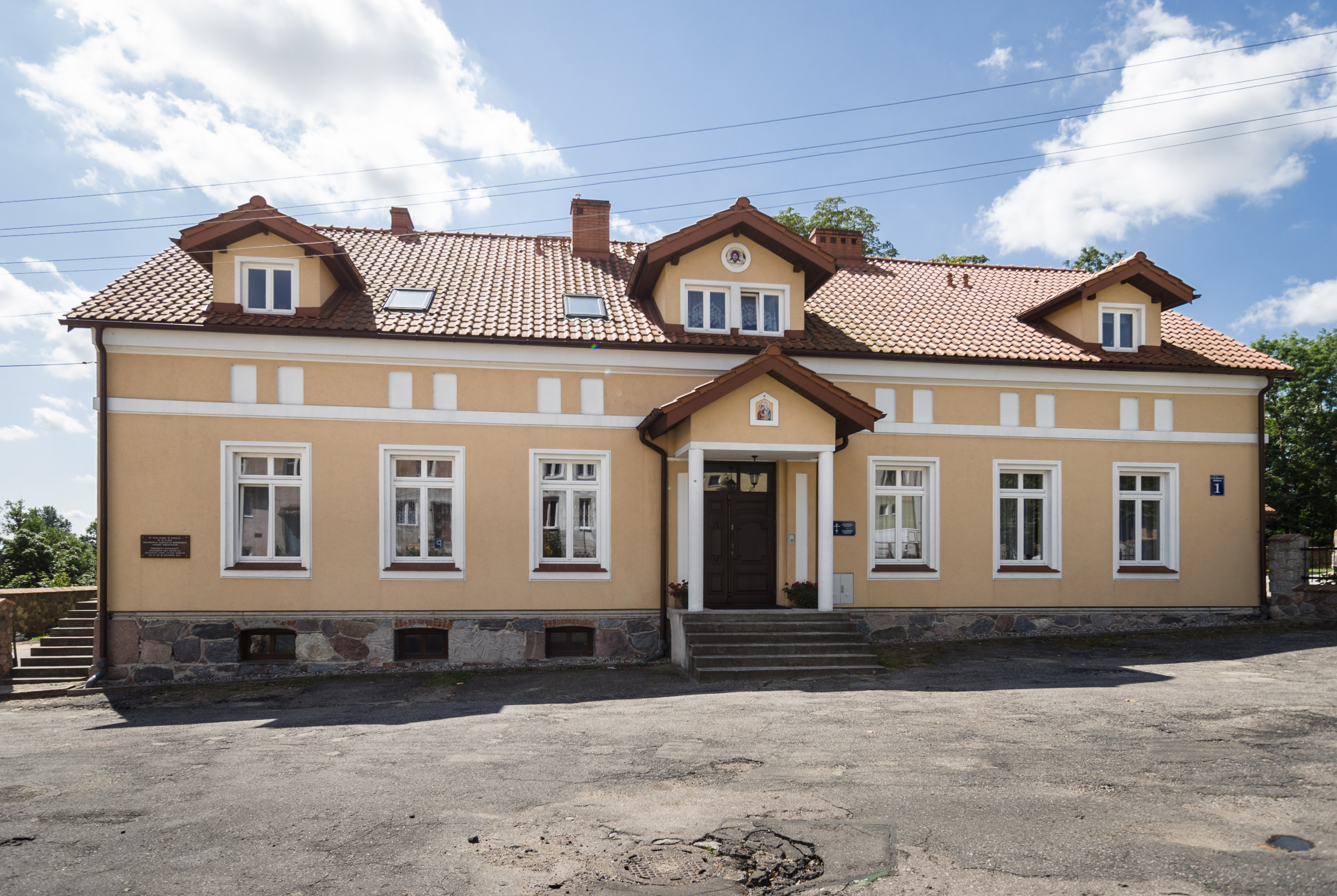 Plebania przy cerkwi greckokatolickiej Podwyższenia Krzyża Świętego, ul. ks. Mirosława Ripeckiego 1, Górowo Iławeckie. W tym domu w dniach 17-18 II 1807 przebywał Napoleon Bonaparte Cesarz Francuzów.